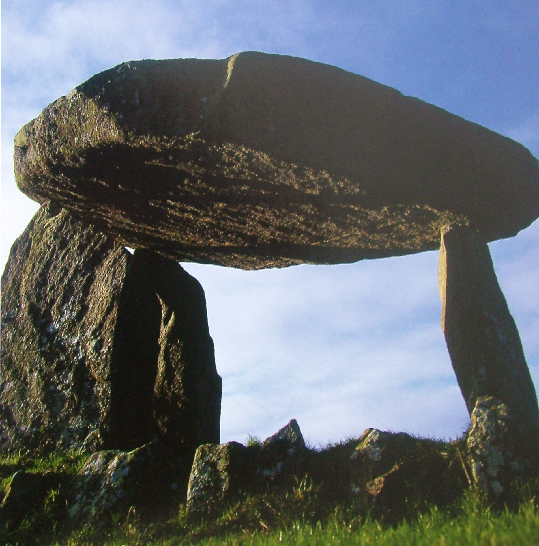 Ballykeel Dolmen (Armagh, Írország)